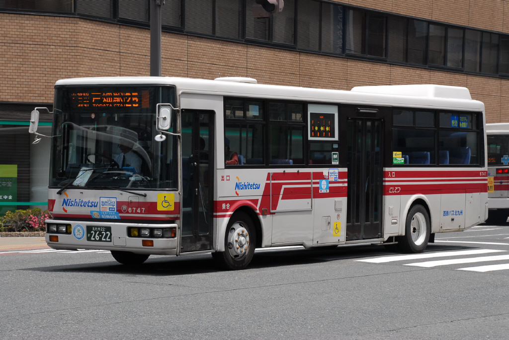 小倉北区にて、2010-5-29撮影